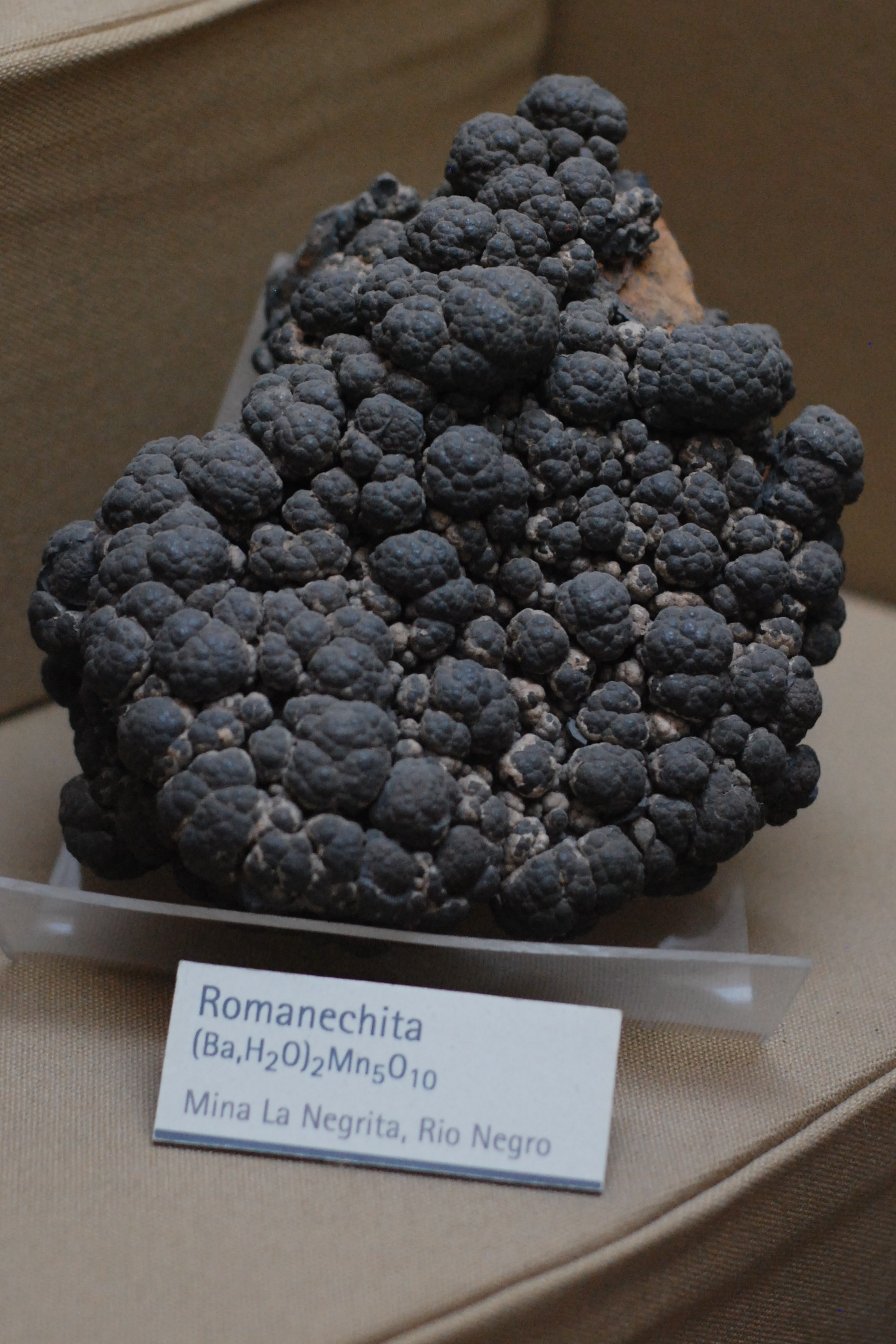 Romanechita. Mina La Negrita, Río Negro, Argentina.